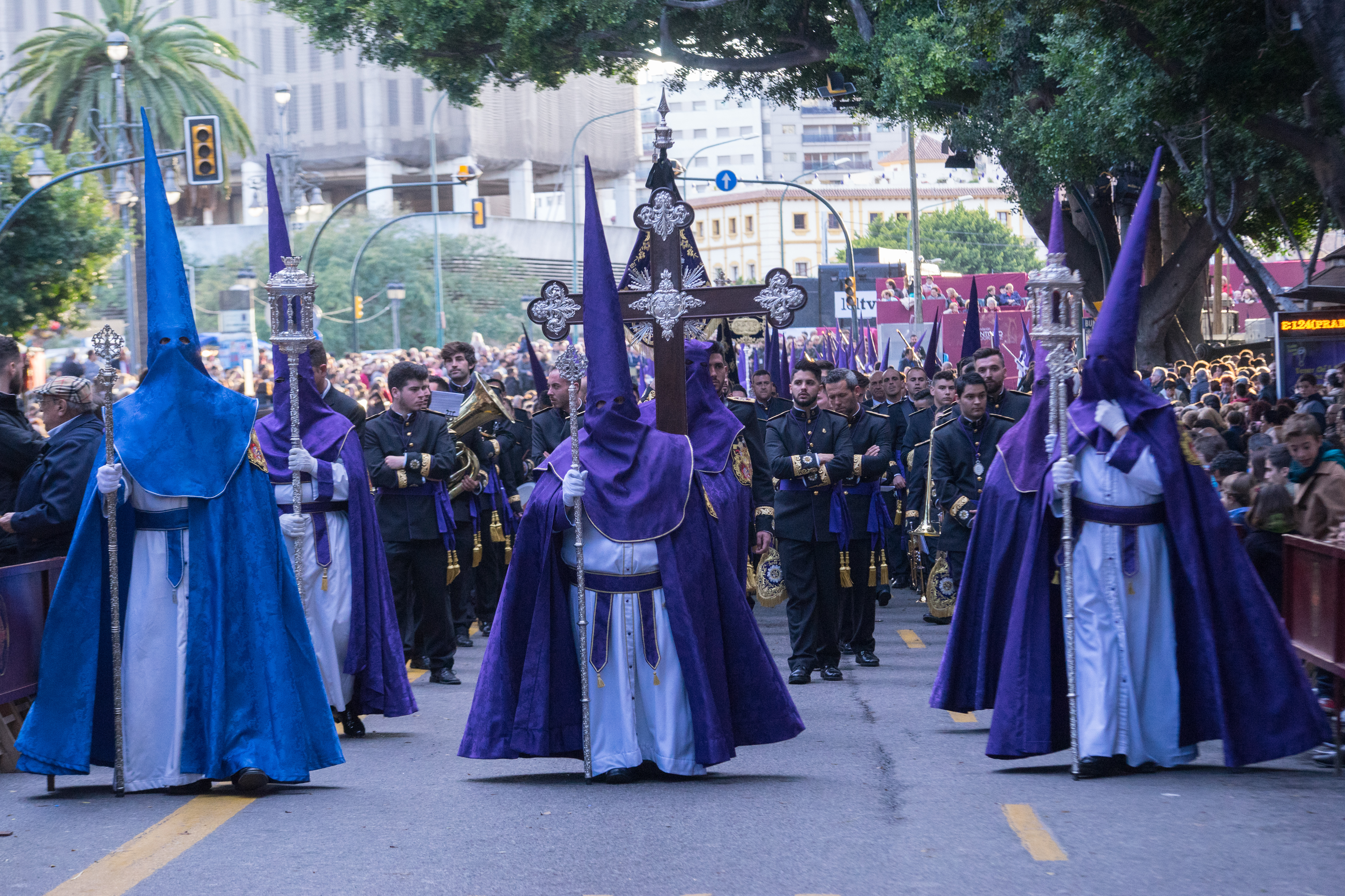 Cabecera de la Pontificia, Muy Ilustre y Venerable Archicofradía Sacramental y Seráfica de Nuestro Padre Jesús Orando en el Huerto, Nuestra Señora de la Concepción, San Juan Evangelista y Nuestra Señora de la Oliva This is a photography of a Folklore festival in Spain (Wikidata id Q9075883).